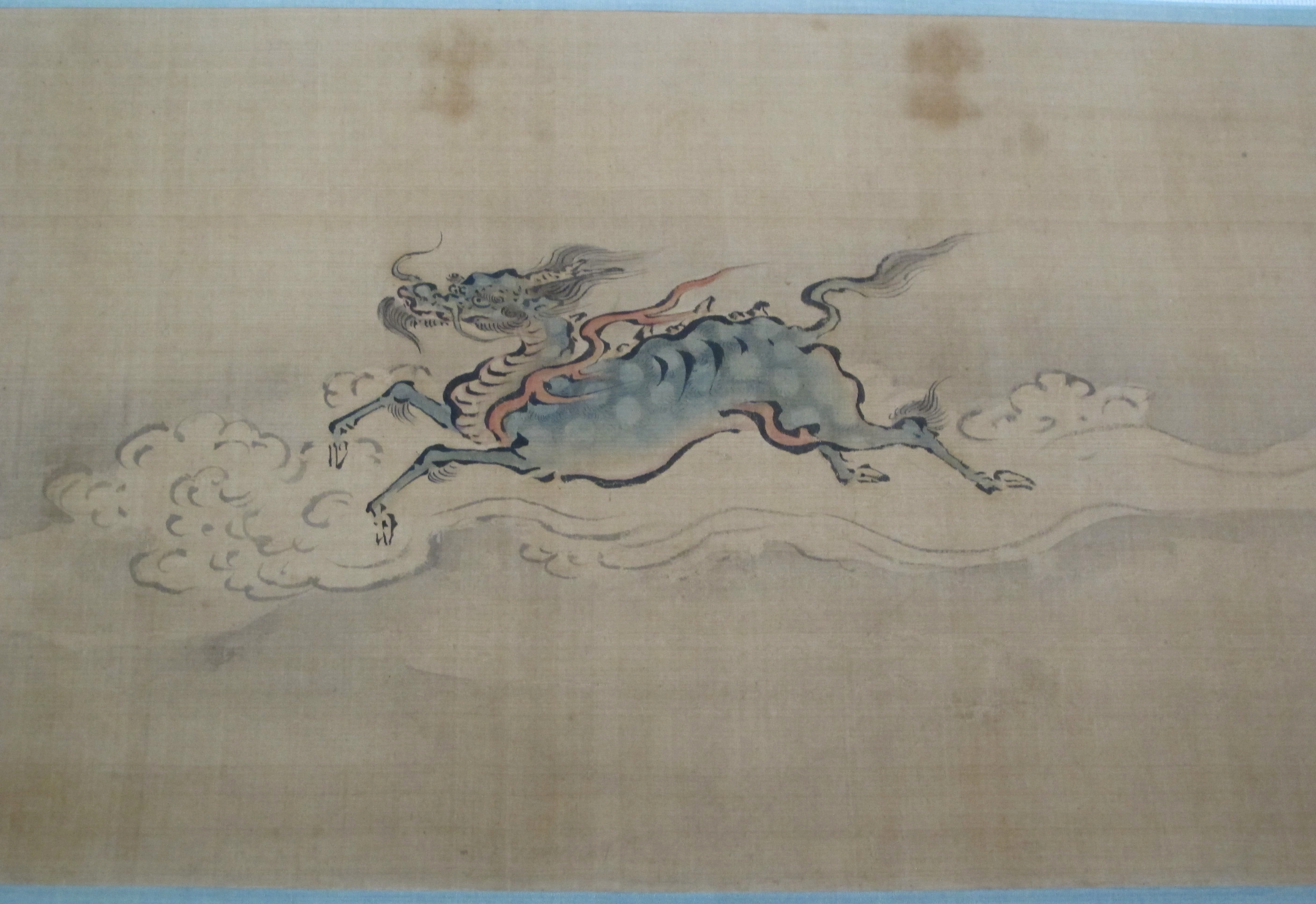 Periodo edo, kano tan'yu, uccelli volanti e animali che corrono, 1666